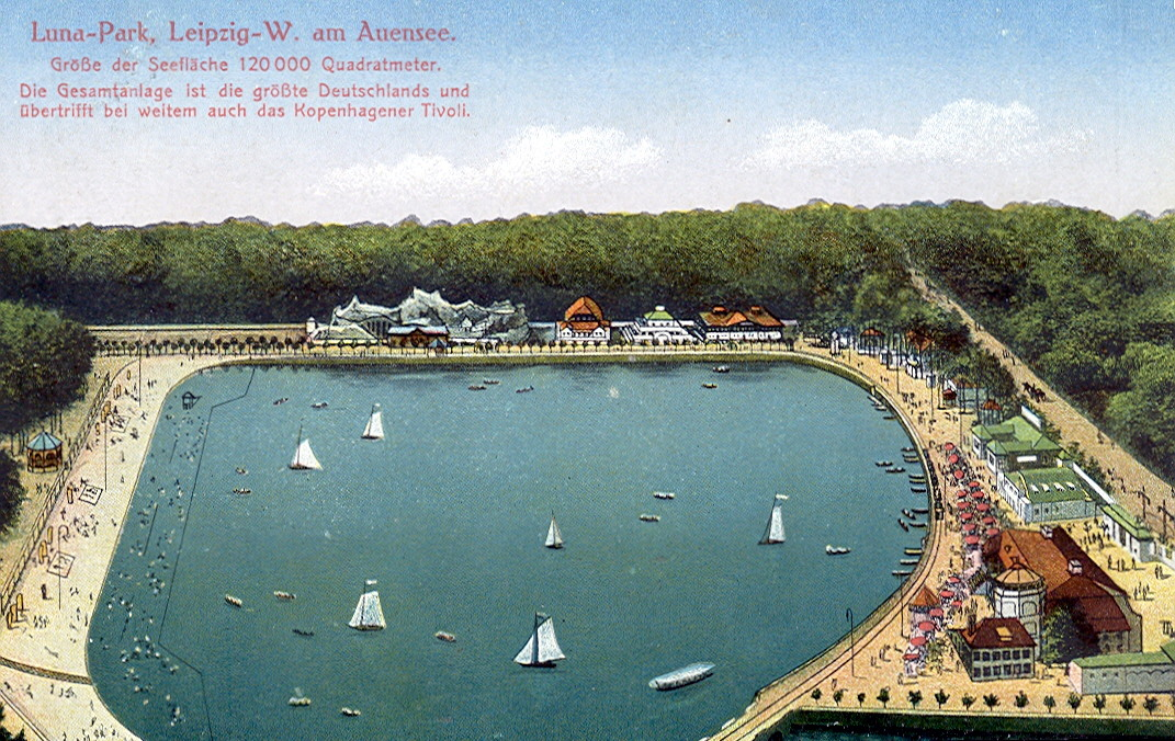 Postkarte, undatiert ( ca.1914 ). Beschriftung: "Luna-Park, Leipzig-Wahren am Auensee. Größe der Seefläche 120.000 Quadratmeter. Die Gesamtanlage ist die größte Deutschlands und übertrifft bei weitem den Kopenhagener Tivoli. Größtes Vergnügungs-Etablissement Deutschland. Größe ca. 1/2 Million Quadratmeter."